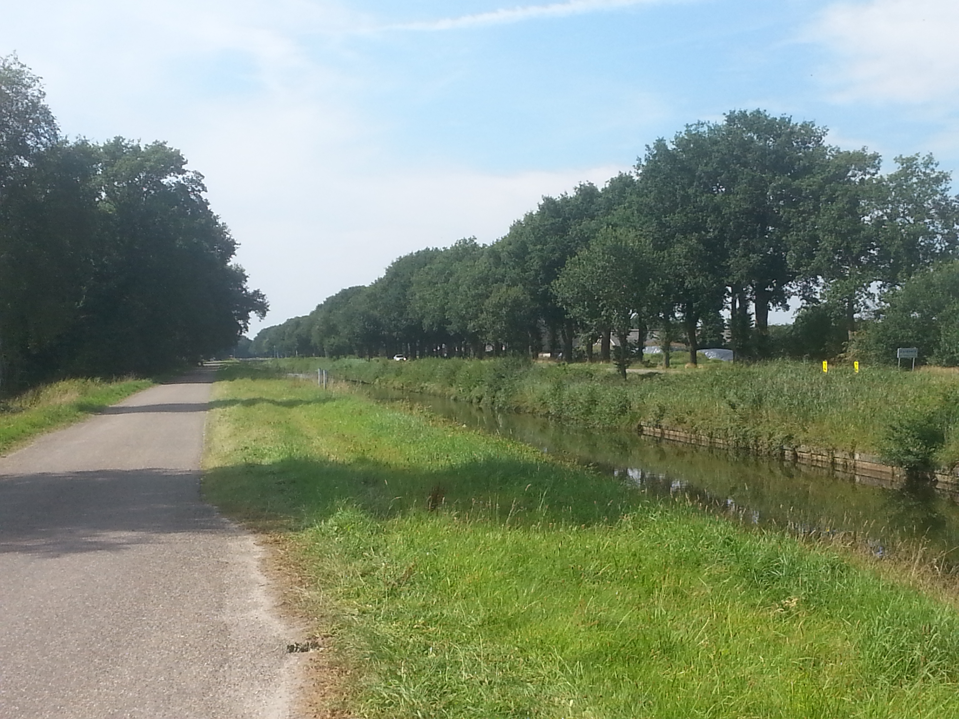 Het Drentse buurtschapje Zuidvel tijdens een fietstocht.